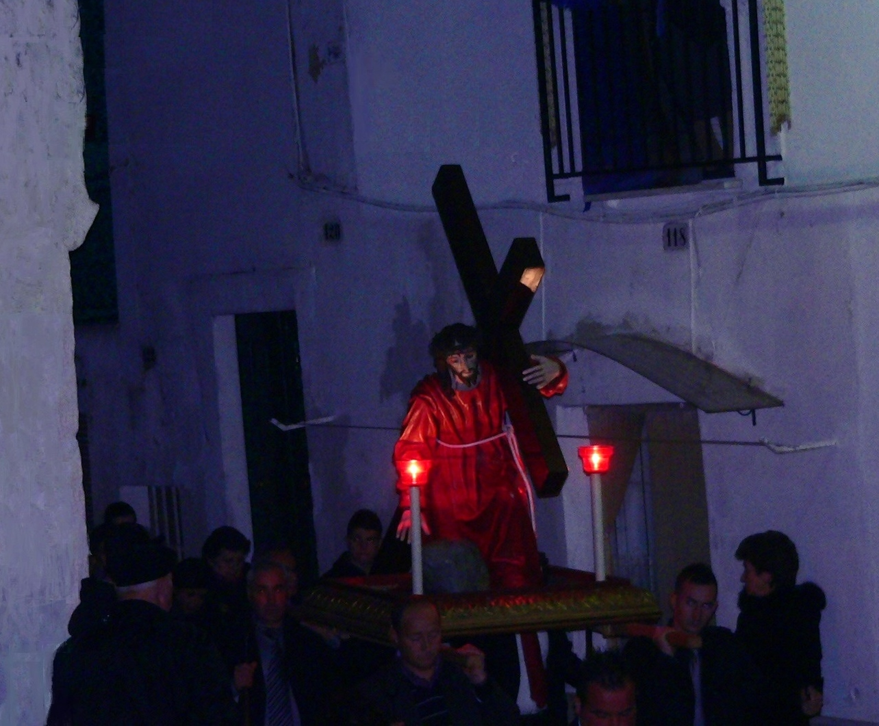 Statua di Cristo sotto la croce portata in processione a Ceglie Messapica in occasione della processione dei Misteri.